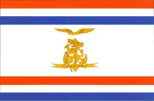 onderscheidingsvlag minister van defensie